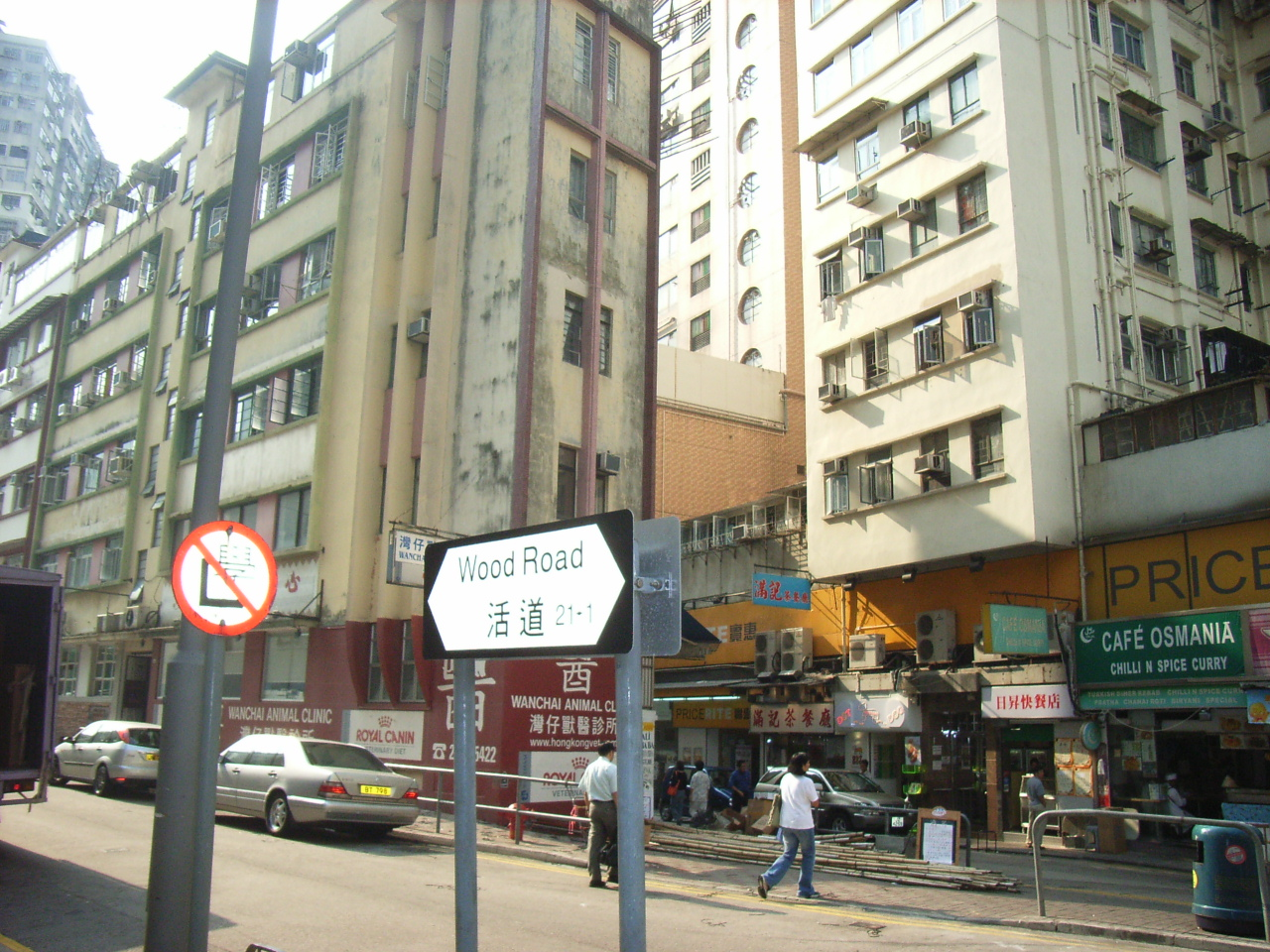 灣仔zh:活道